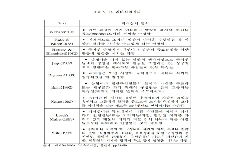 리더십표